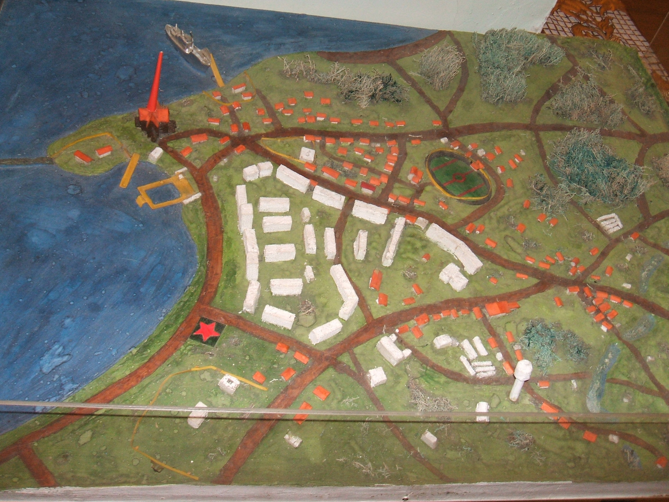 Приморск Лен.обл.